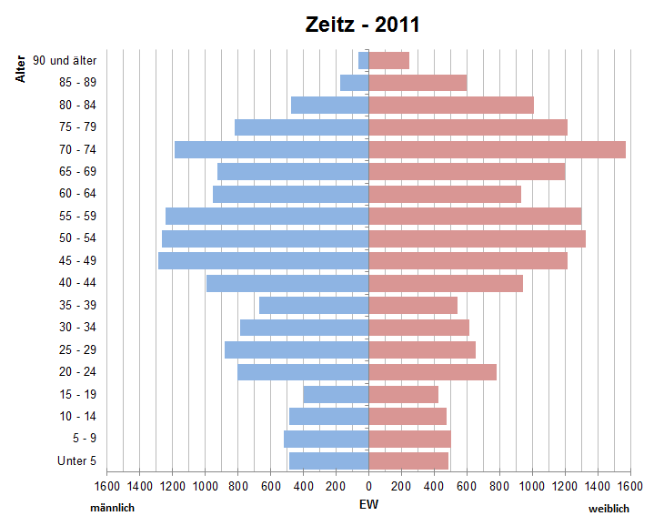 Bevölkerungspyramide der Stadt Zeitz nach Zensus 2011.